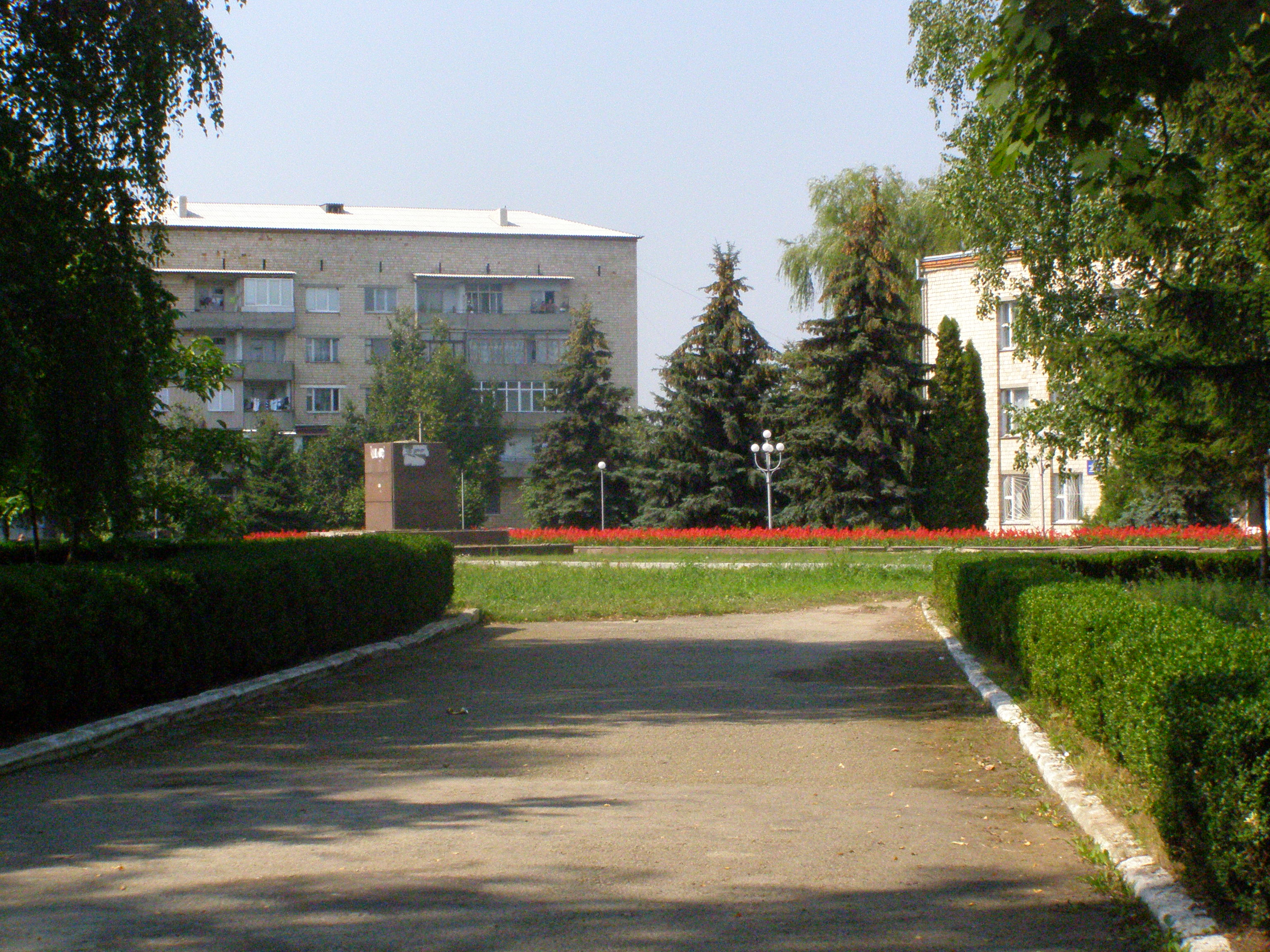 Chotyn, náměstí